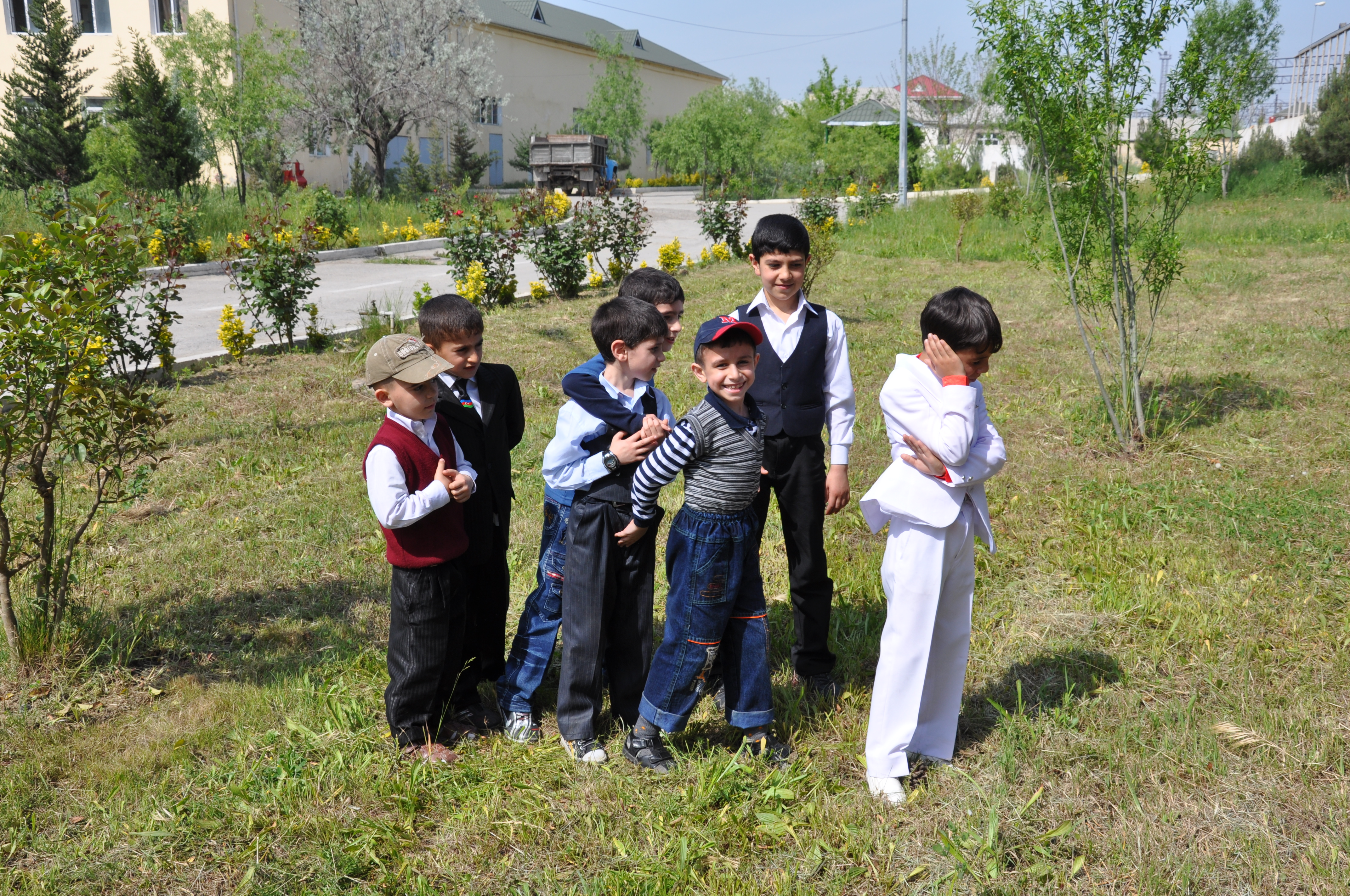 Usta şagird — Azərbaycanda ən çox yazqabağı (bayramqabağı) günlərdə əsasən uşaq və gənclər arasında, geniş şəkildə oynanılan qədim oyunlarından biridir.